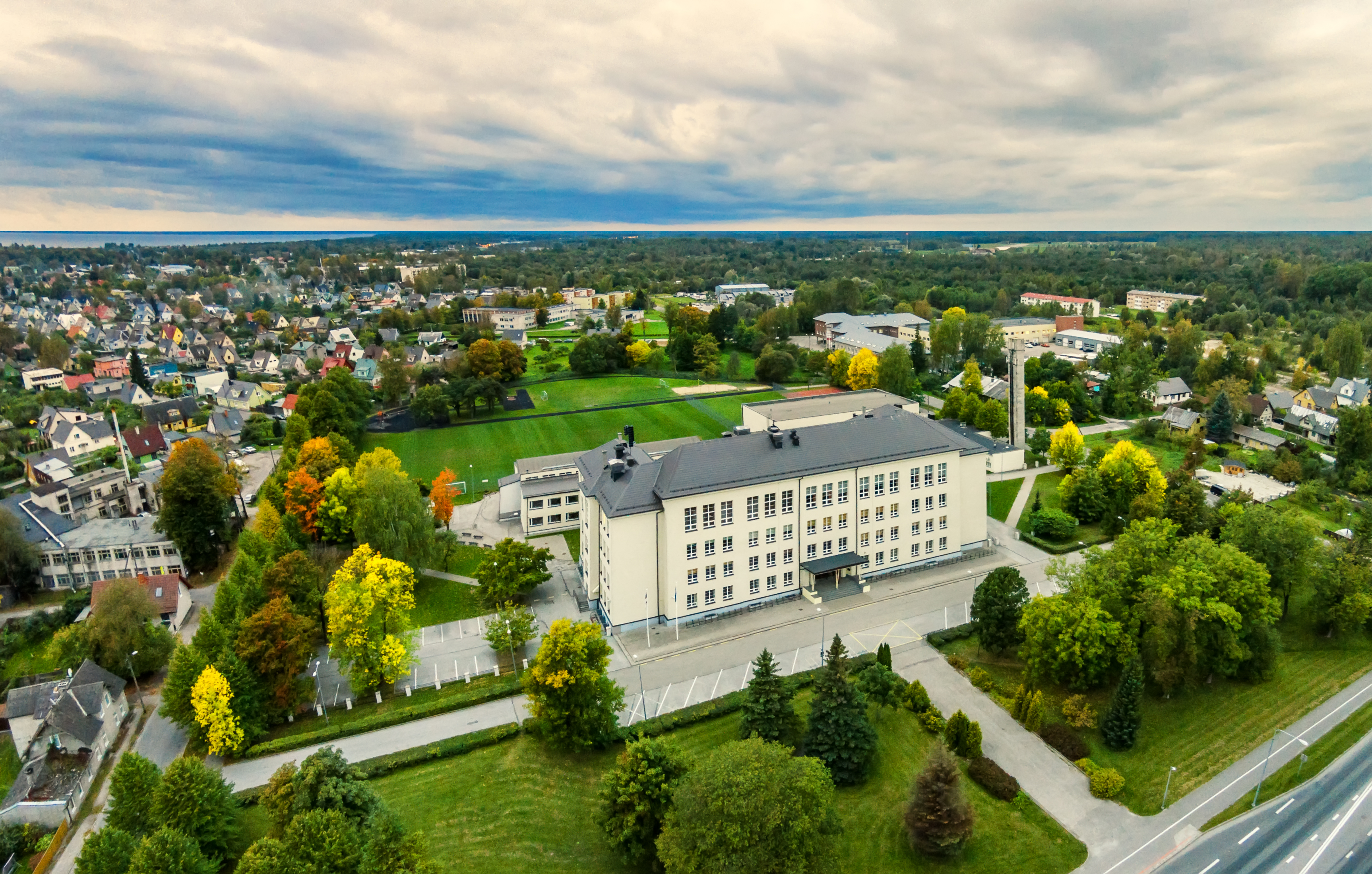 Pärnu Ülejõe Gümnaasium